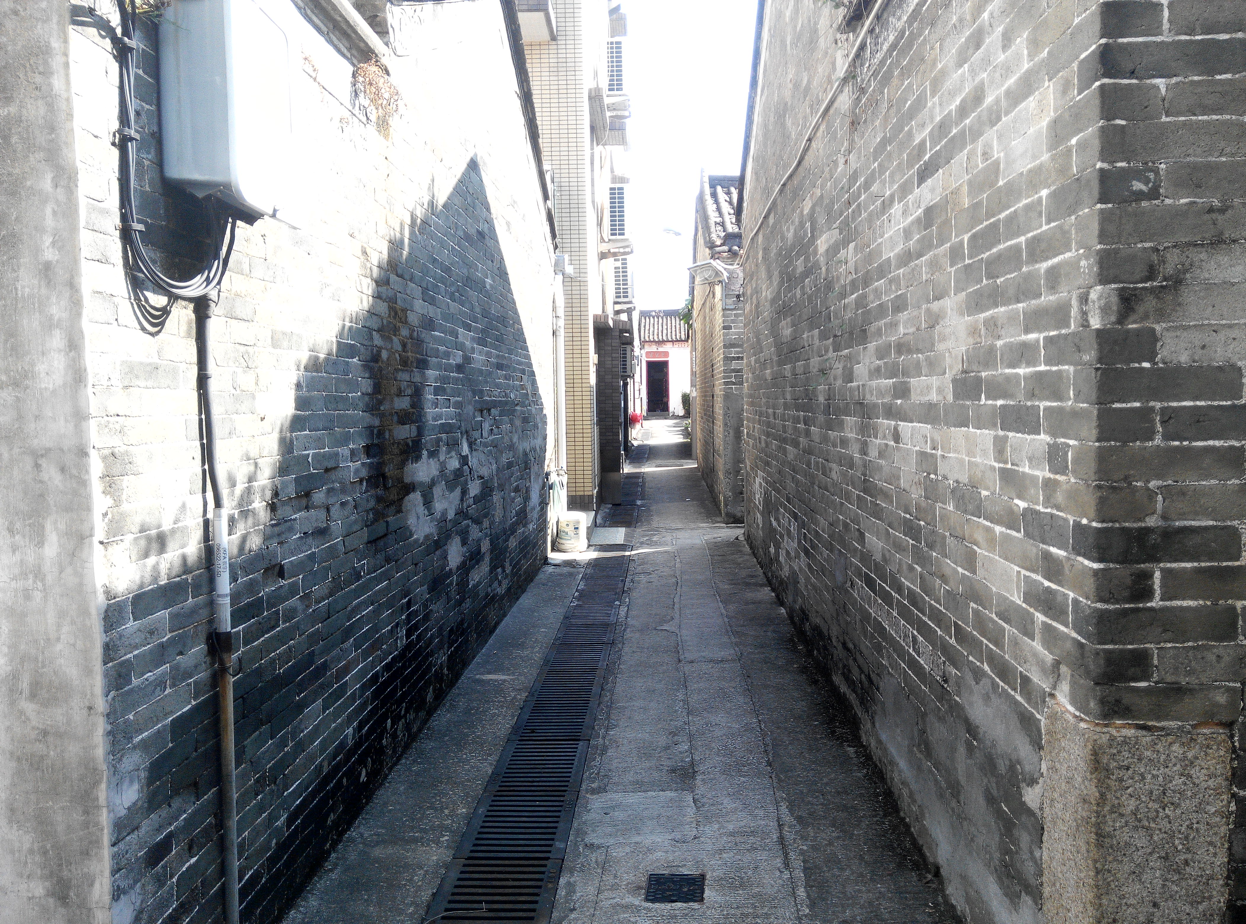 永隆圍圍內中軸線，後方為眾聖宫